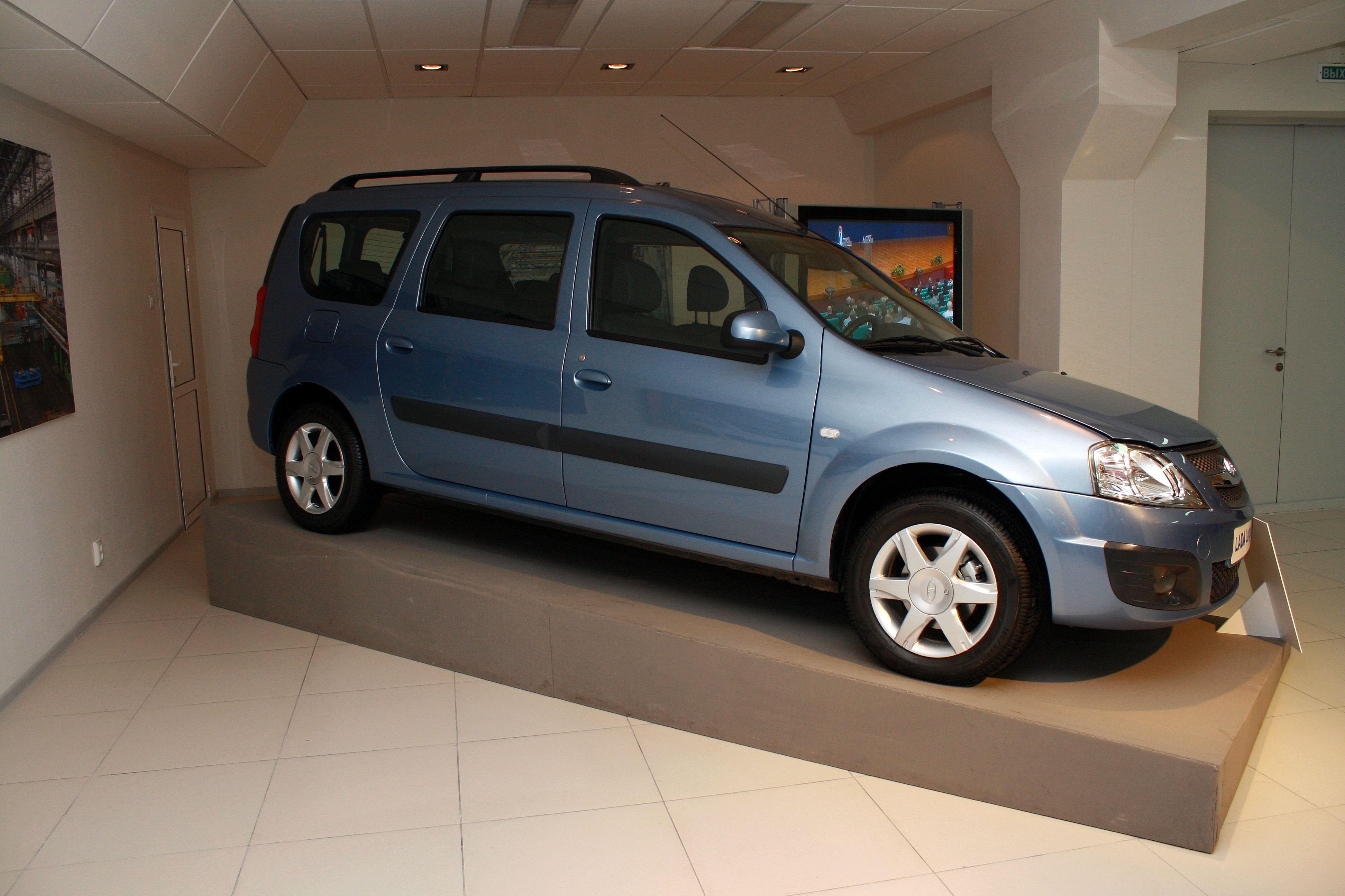 Largus в музее АвтоВАЗа, вид сбоку